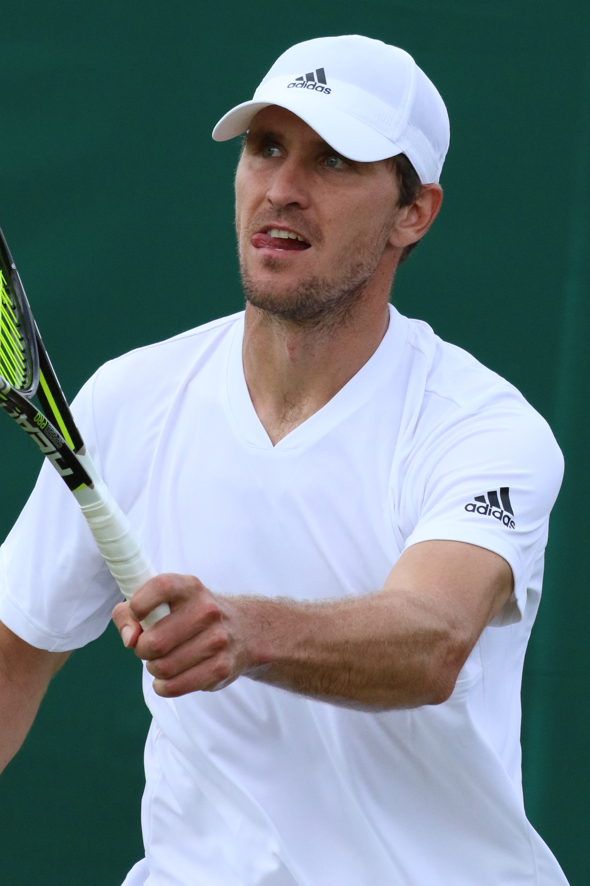 Zverev M. WMQ16 (7)